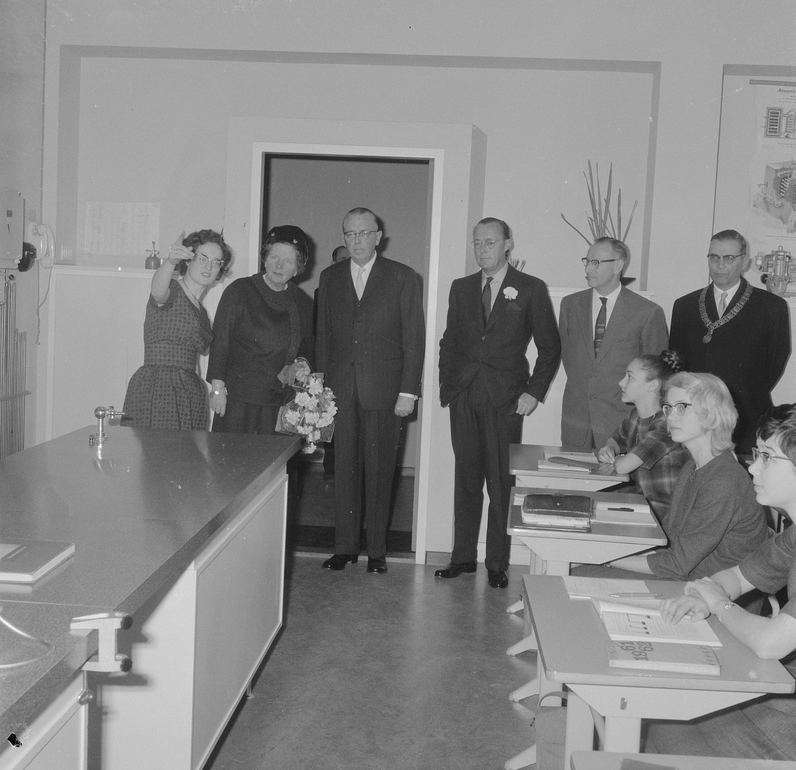 Collectie / Archief : Fotocollectie Anefo Reportage / Serie : [ onbekend ] Beschrijving : Koninklijk paar bezoekt Cartesiuslyceum Datum : 2 februari 1962 Fotograaf : Nijs, Jac. de / Anefo Auteursrechthebbende : Nationaal Archief Materiaalsoort : Negatief (zwart/wit) Nummer archiefinventaris : bekijk toegang 2.24.01.03 Bestanddeelnummer : 913-4819 Reacties Geplaatst door Geschiedenismens - Onderwijs / Scholen op 13 maart 2017 - 15:49. Uiterst rechts burgemeester Gijs van Hall Cartesius Lyceum Locatie: Piet Mondriaanstraat 140, wijk Overtoomse Veld Plaats: Amsterdam, Noord-Holland Persoonsnaam: Cartesius Lyceum Geplaatst door Geschiedenismens - Onderwijs / Scholen op 13 maart 2017 - 15:57. Links docente natuurkunde, mevrouw F.B. Honig-van Melsen, rechts naast de koningin de rector G.W. Bolkestein, rechts naast de prins de conrector dr. P.J. Reimer